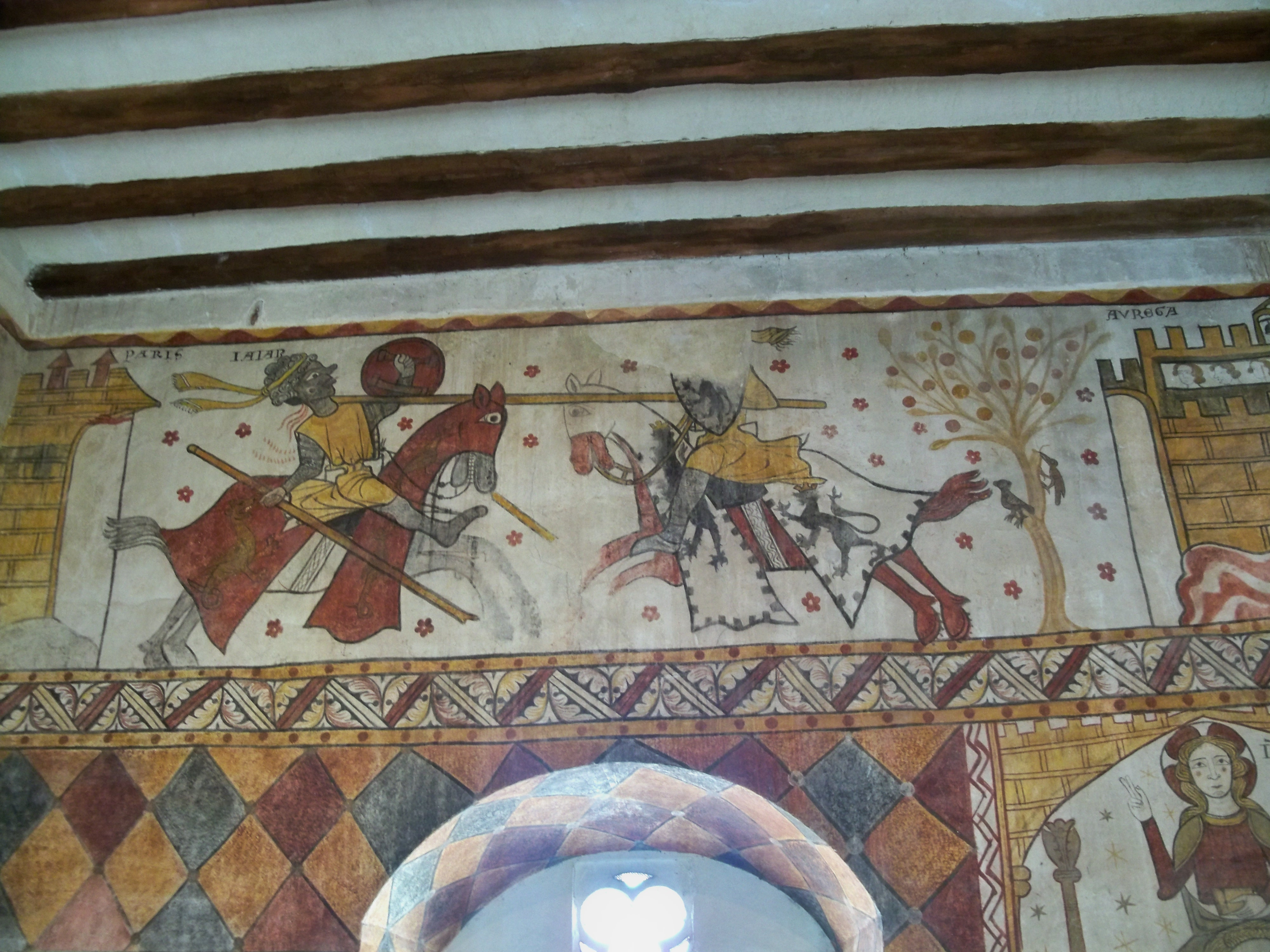 fresques de la Tour Ferrande à Pernes les Fontaines, Vauccluse, France